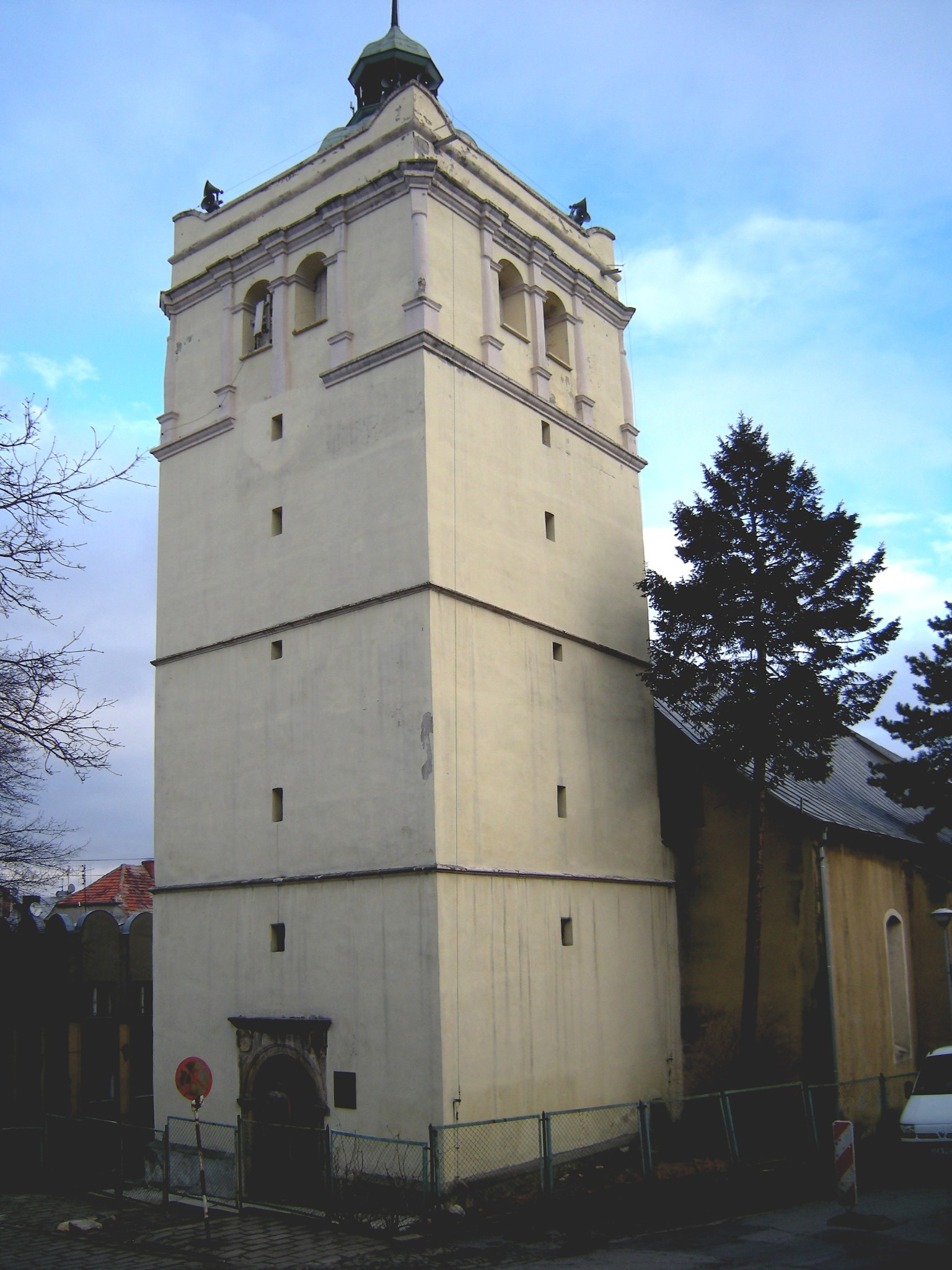 Złoty Stok, plac Kościelny 2 - dawny kościół ewangelicki, obecnie hala sportowa, 1545, XVII, 1785 (wieża XIV/XV)